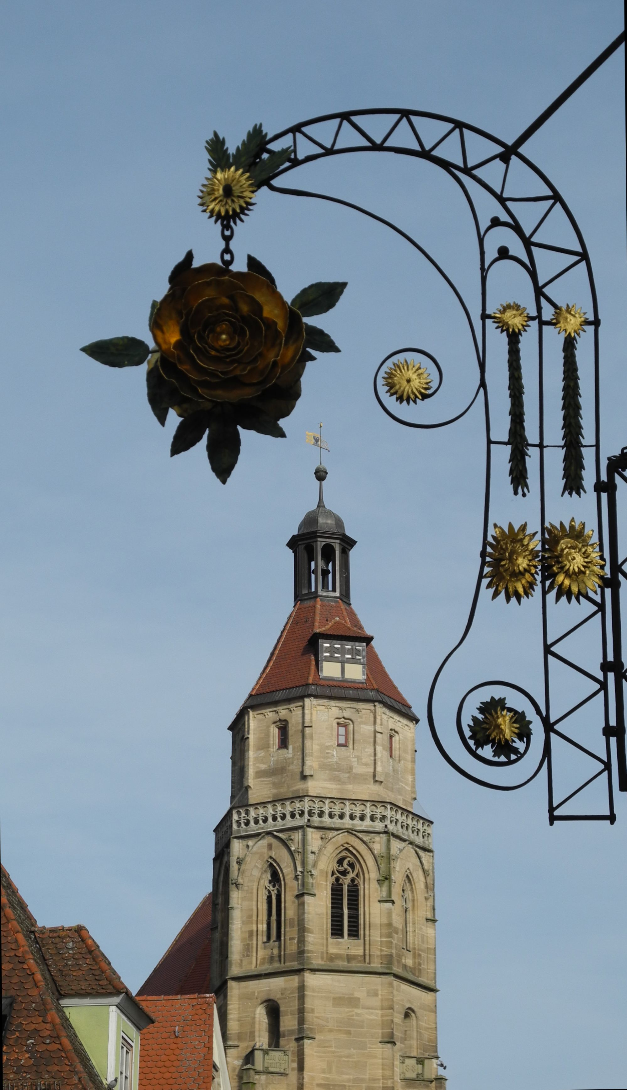 Weißenburg -Turm der St.Andreaskirche,Schild